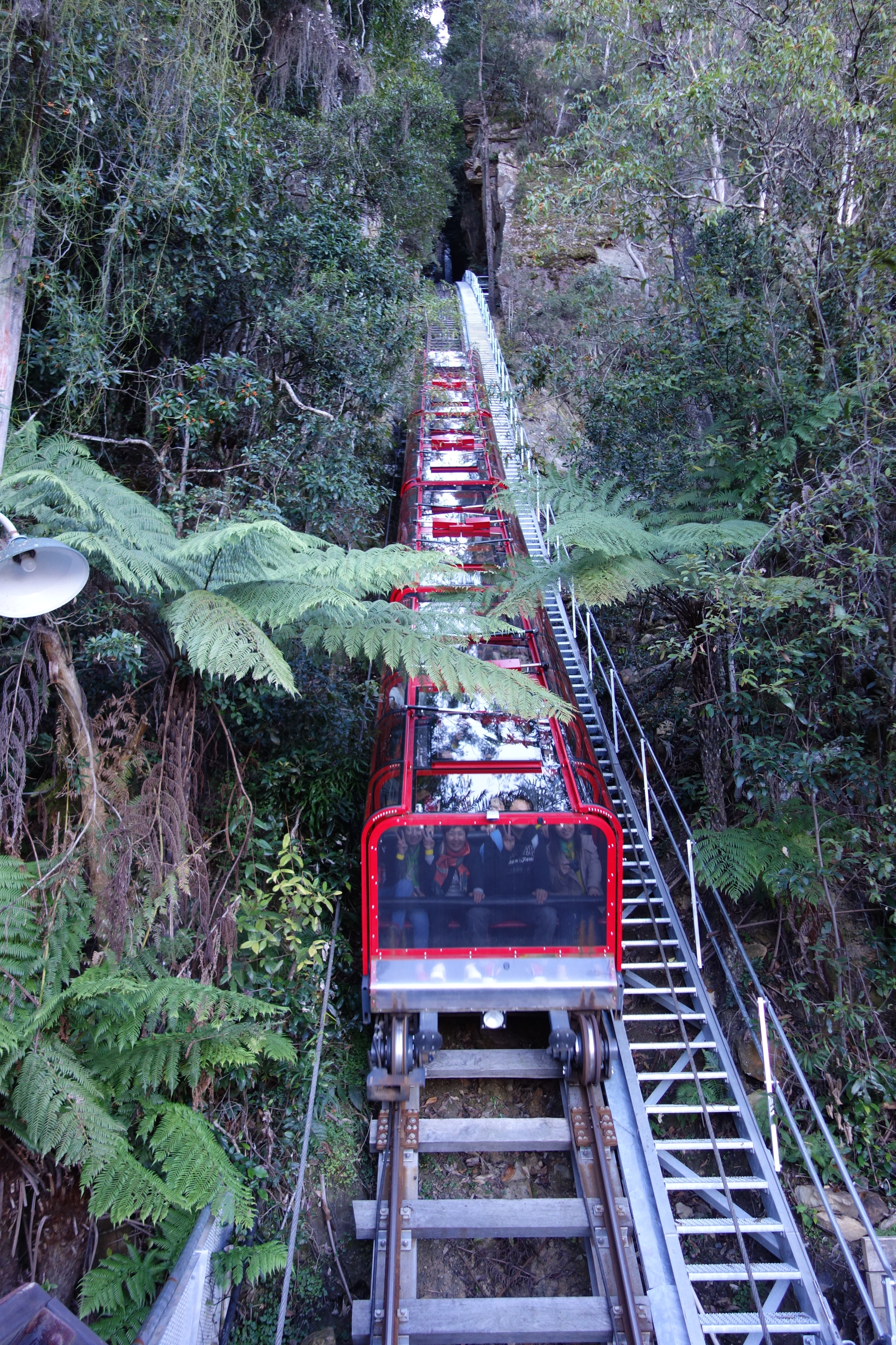 Australia 2014